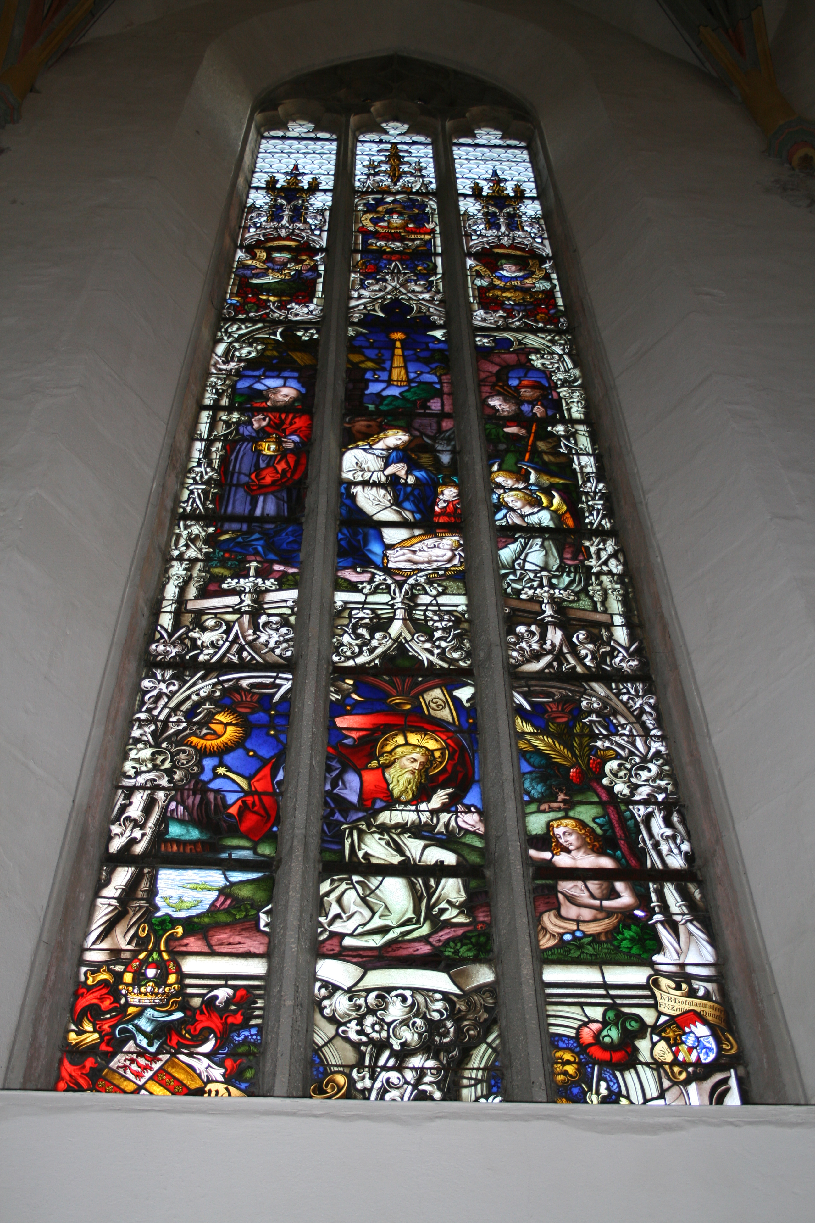 Die historisierende Verglasung in St. Martin, Memmingen